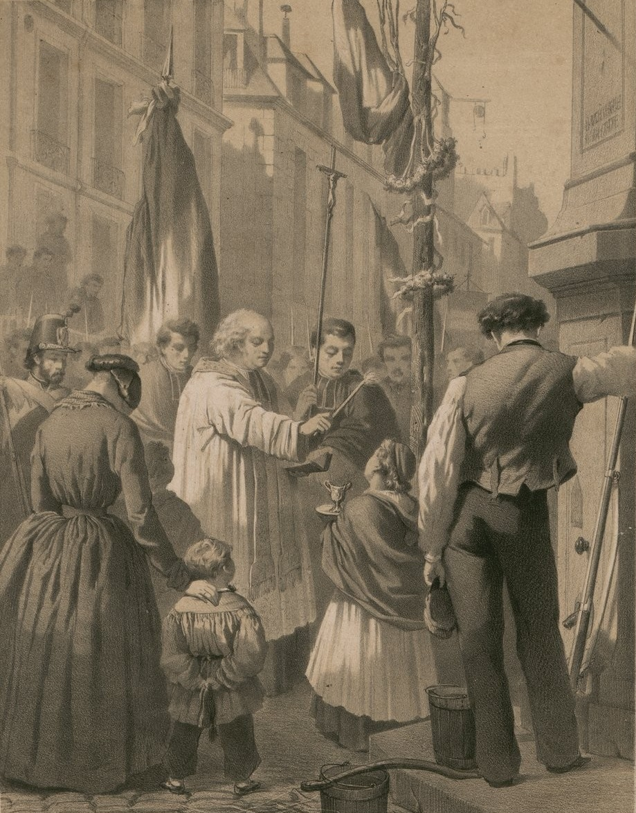 Bénédiction d'un arbre de la Liberté par un prêtre catholique, pendant la République de 1848. Collection de Vinck. Un siècle d'histoire de France par l'estampe, 1770-1870. Vol. 110 (pièces 13842-13938), République de 1848.